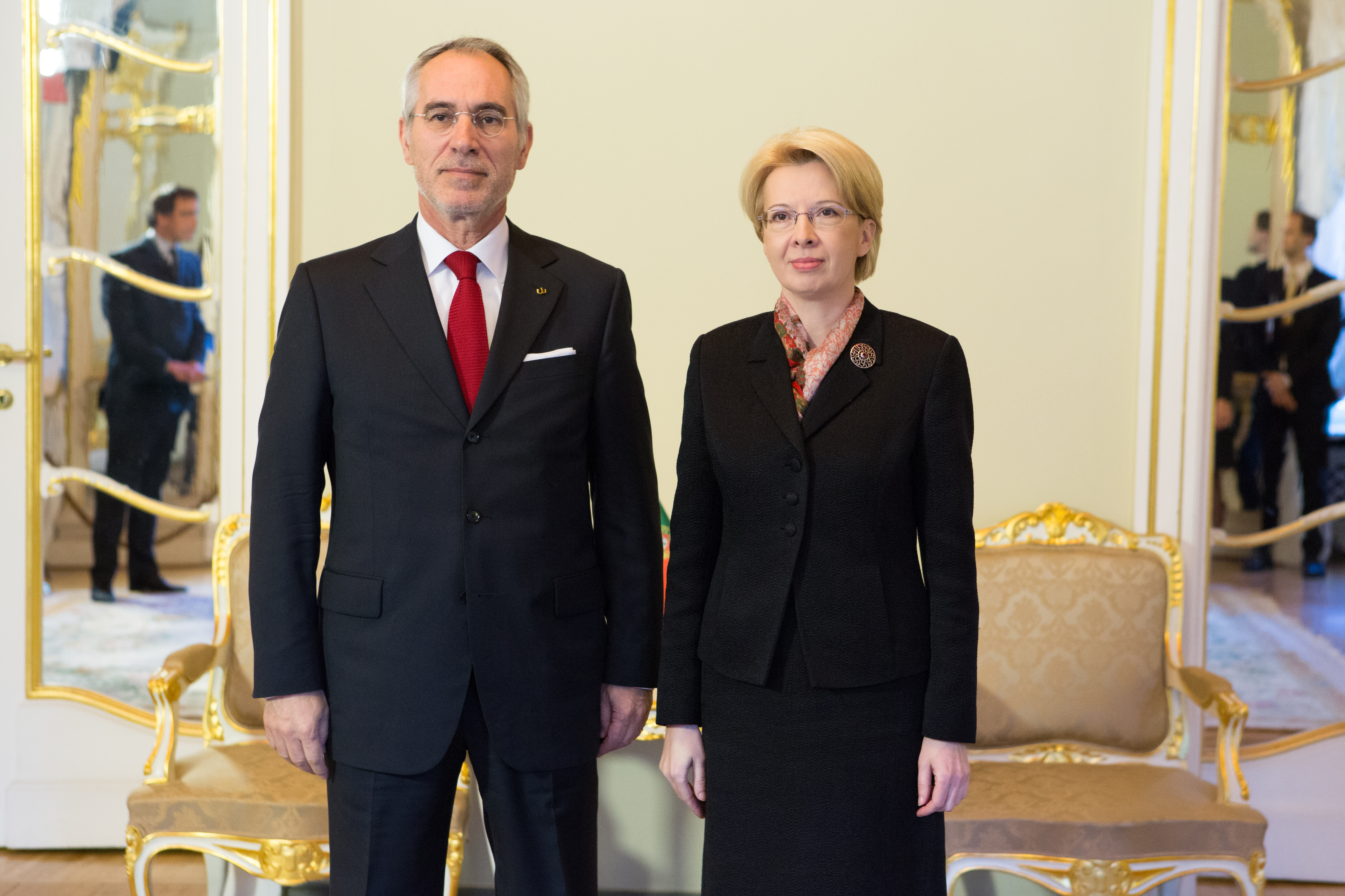 2015.gada 15.decembris. Saeimas priekšsēdētāja Ināra Mūrniece tiekas ar Portugāles Republikas ārkārtējo un pilnvaroto vēstnieku Latvijas Republikā Žuzē Žūliu Pereiru-Gomešu (José Júlio Pereira Gomes). Foto: Ernests Dinka, Saeimas Administrācija Izmantošanas noteikumi: saeima.lv/lv/autortiesibas